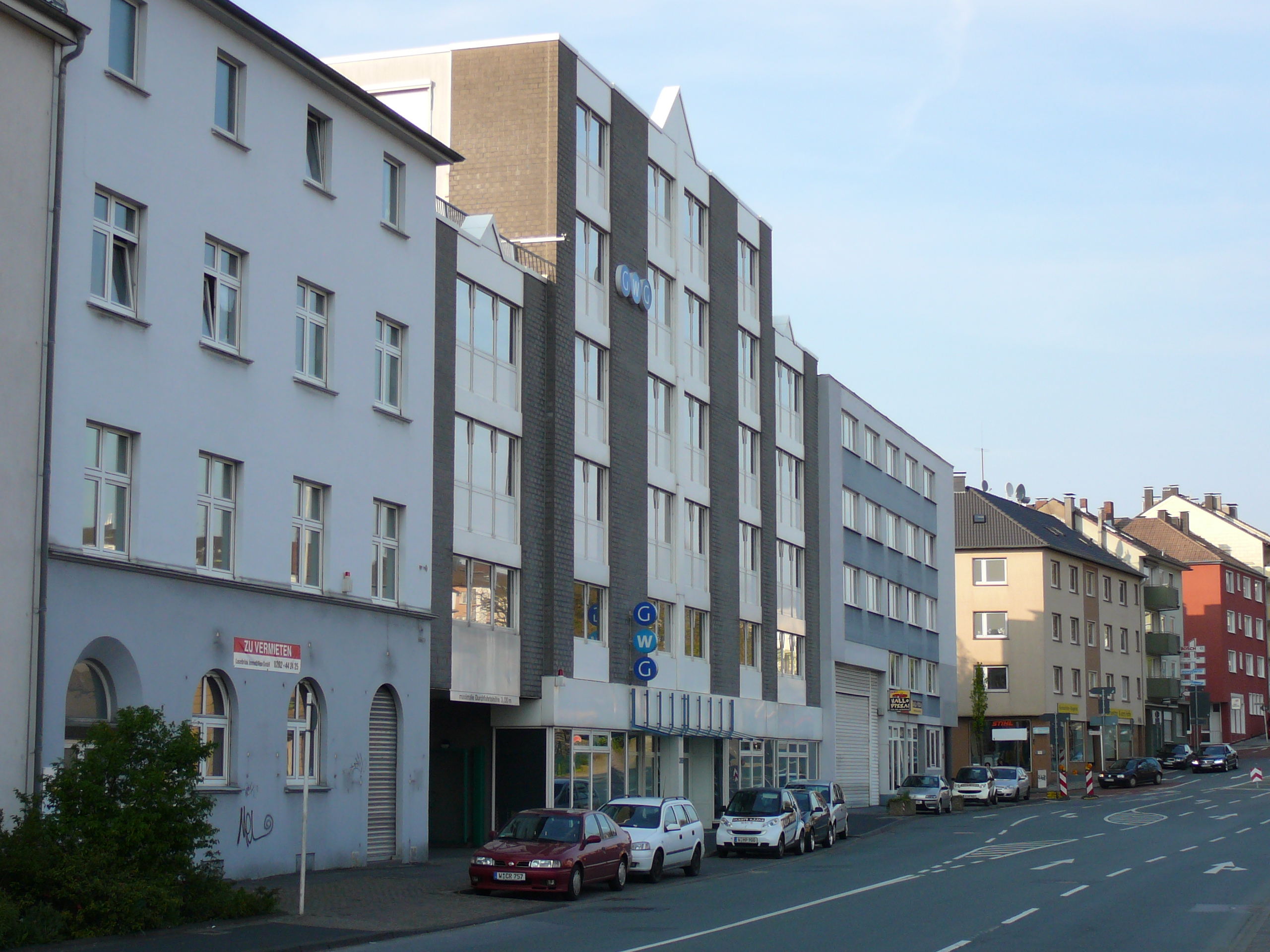 Hoeftstraße, Wuppertal